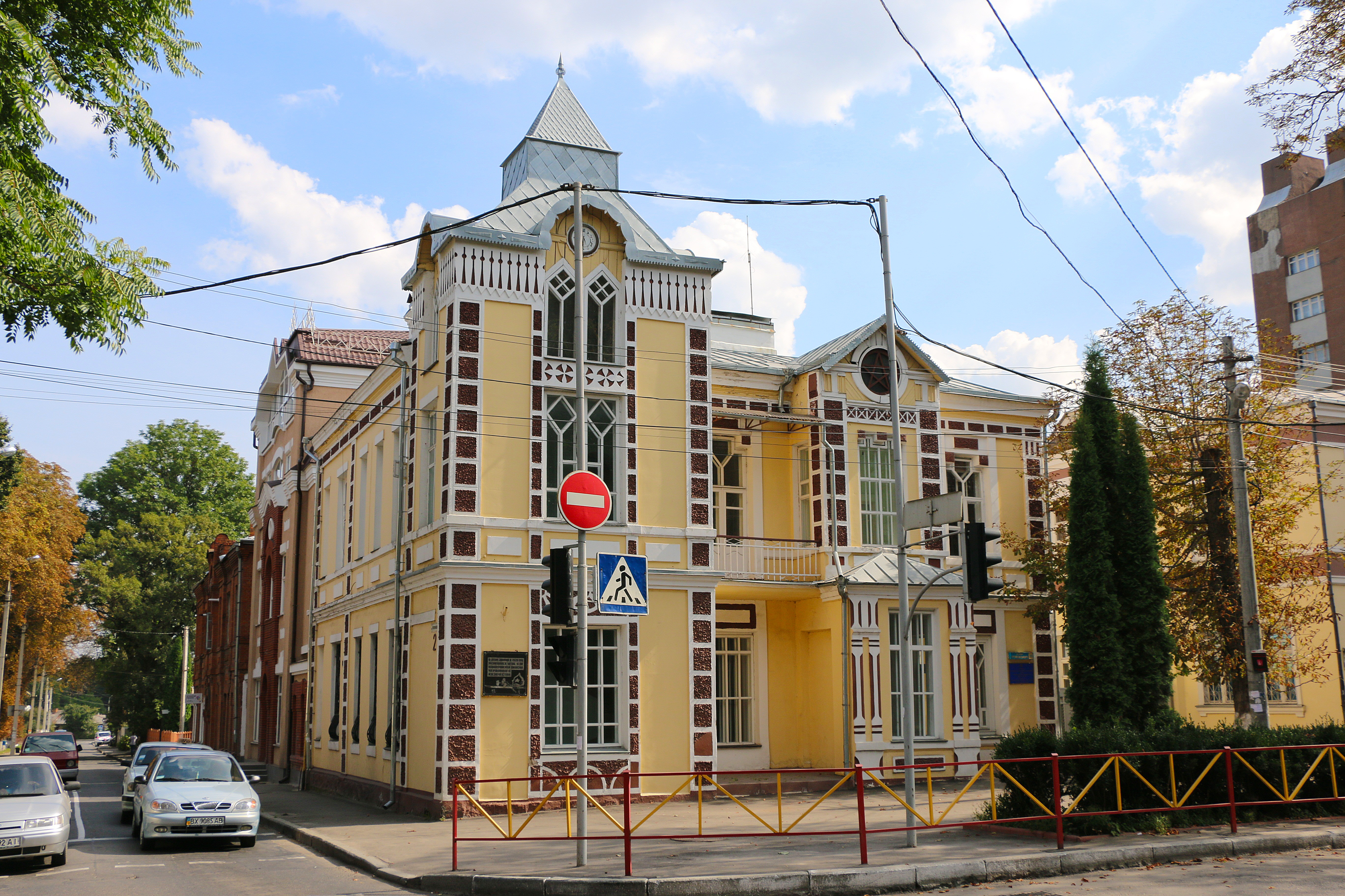 Особняк, де розміщувався штаб 8-ої кавалерійської дивізії Червоного козацтва (мур.), Хмельницький, вул. Грушевського, 95